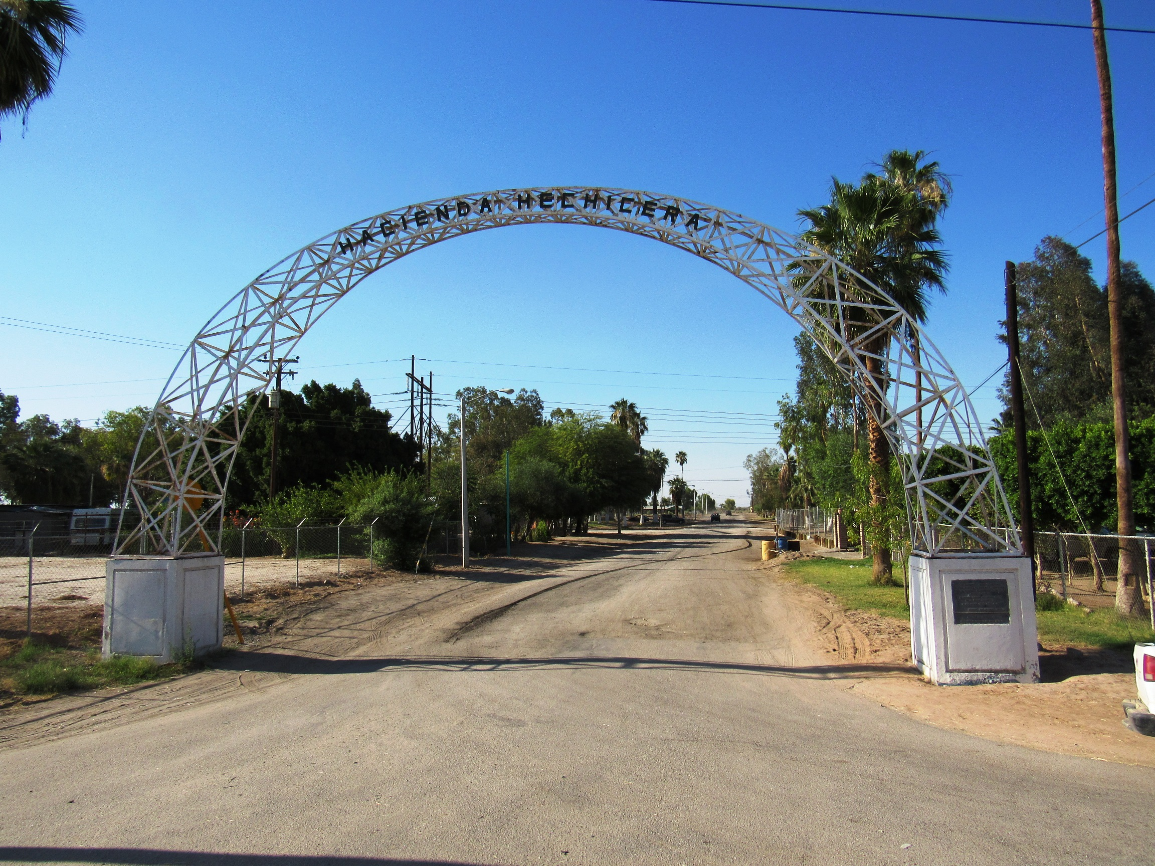 El arco iconico del Poblado Hechicera se encuentra al margen norte de la carretara federal 2.